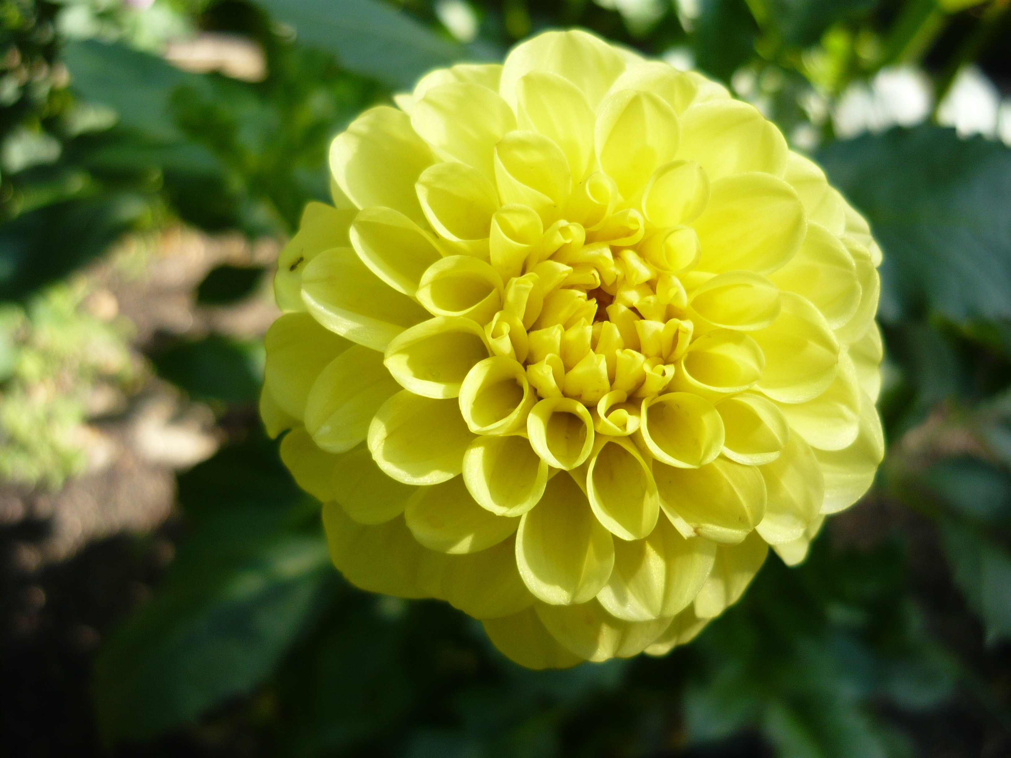 Dahlia 'Golden Torch'. Real Jardín Botánico de Madrid.